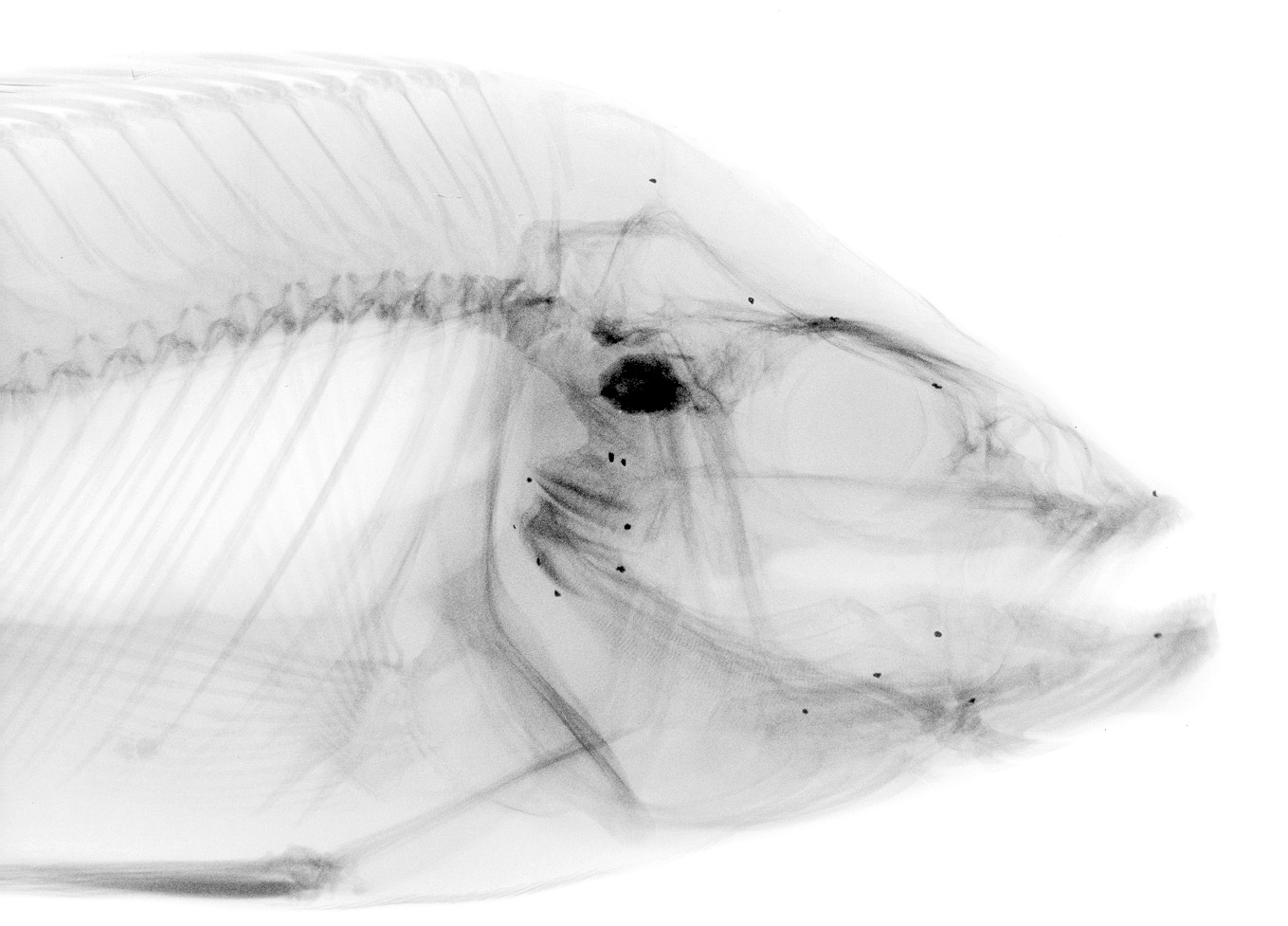 条鰭綱魚類のレントゲン写真。骨格の硬骨化と身体の軽量化を共に果たした条鰭類は、最も多様な種分化を遂げた脊椎動物となっている.